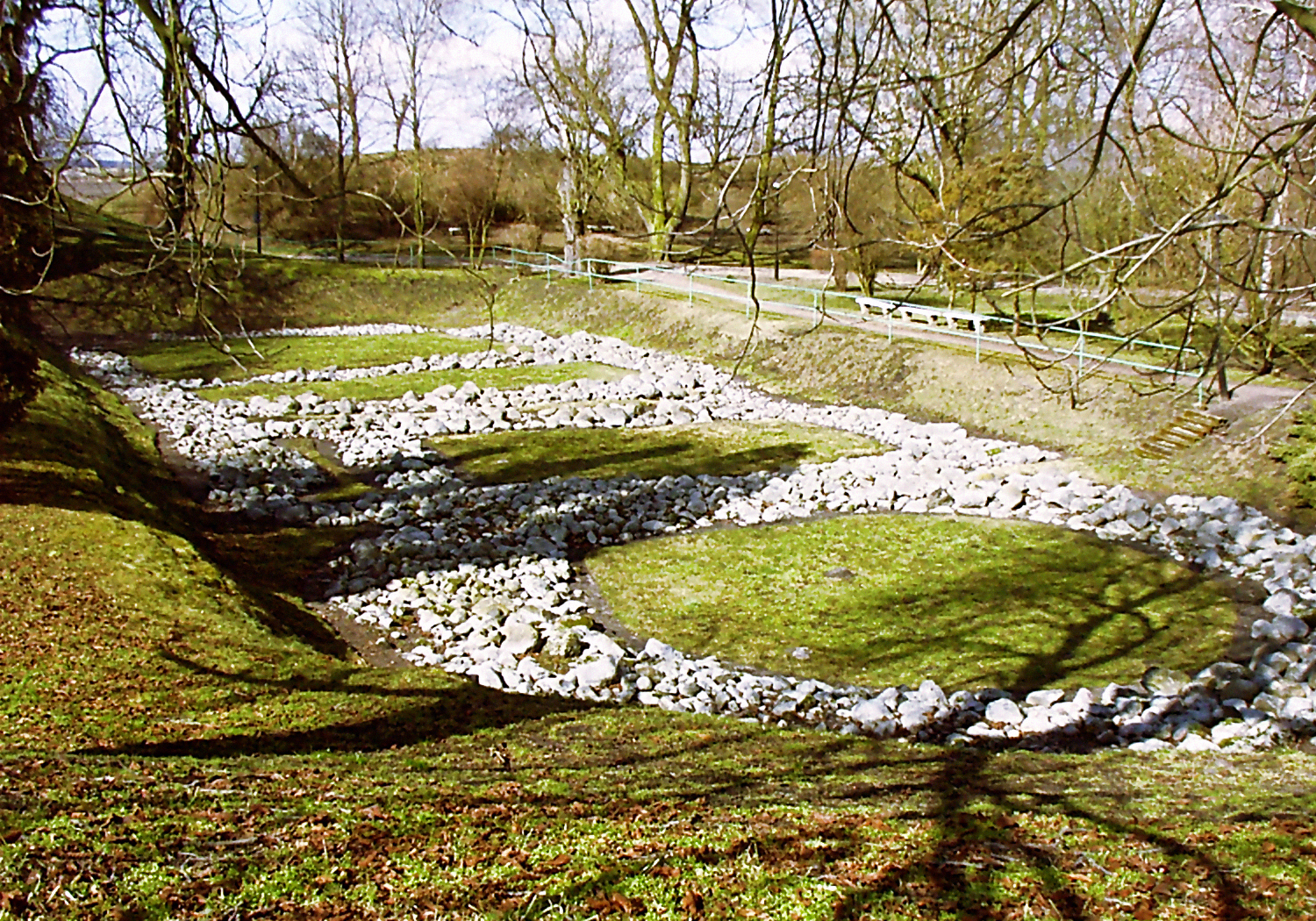 Giecz-Grodziszczko, zarys fundamentów palatium (rekonstrukcja)